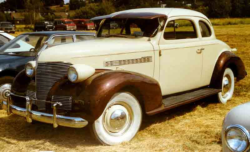 1939 Chevrolet Master Deluxe Coupe